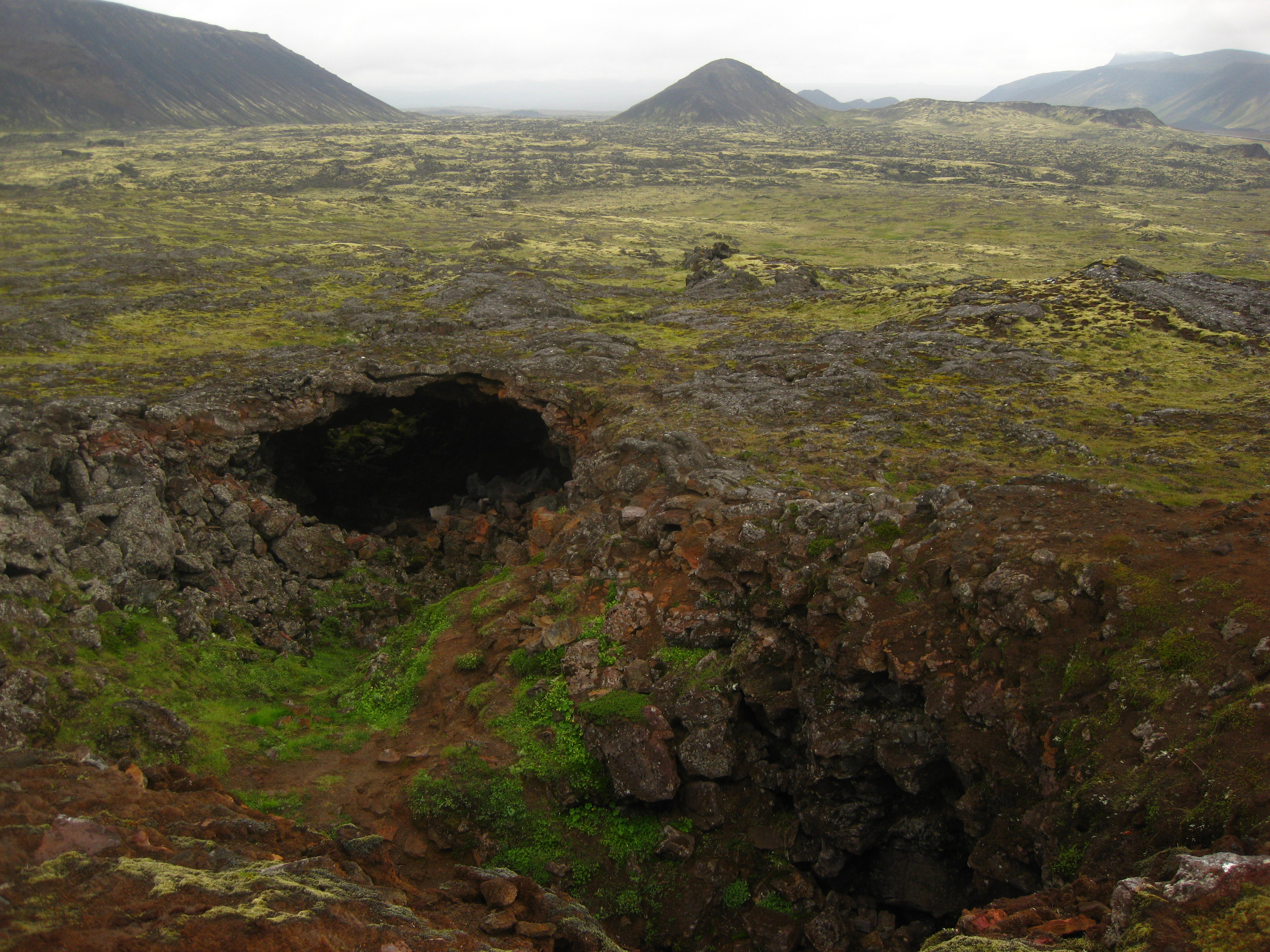 Thrihnukagigur volcano, Iceland. Thrihnukagigur volcano in Iceland